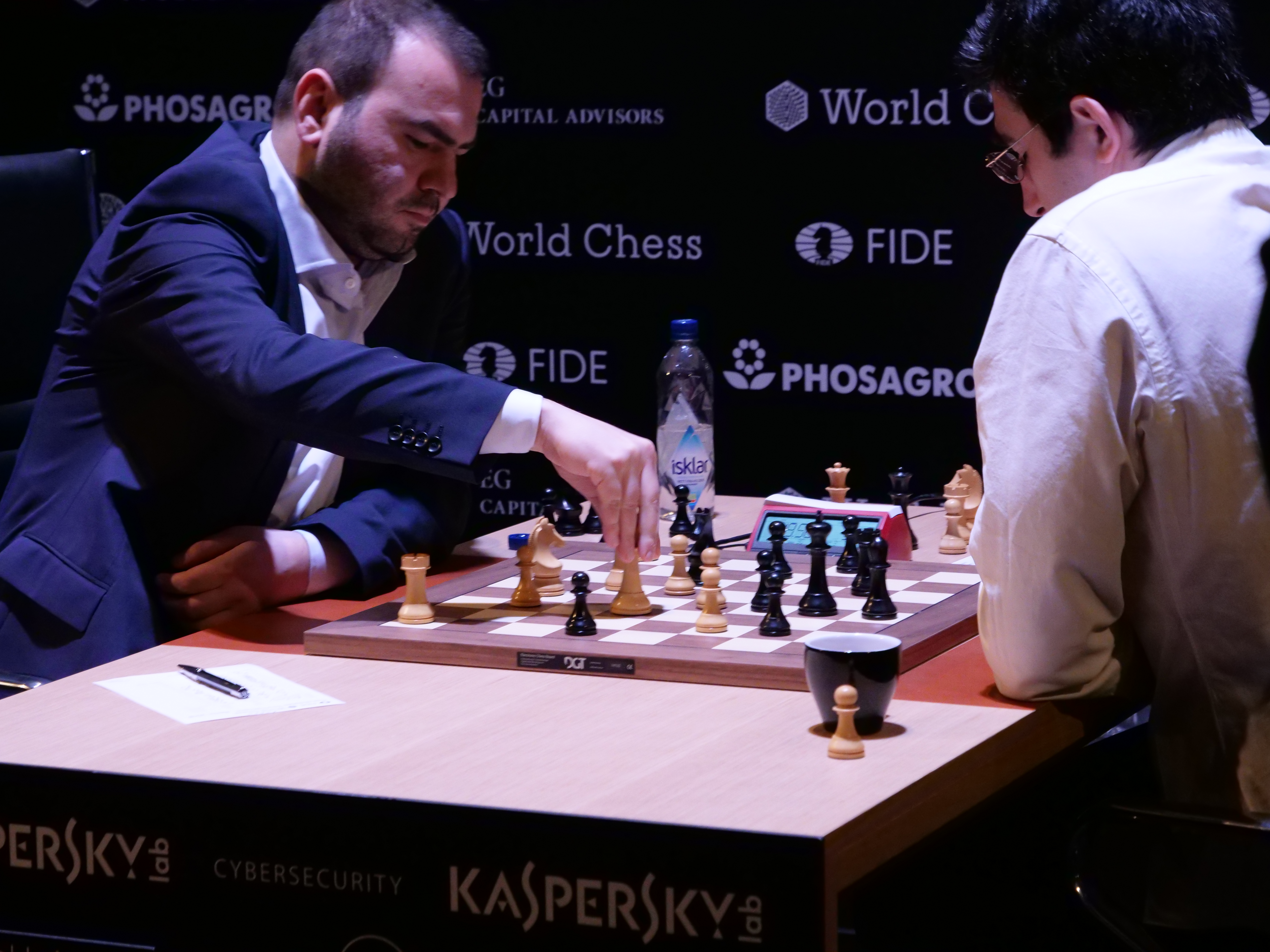 Şəhriyar Məmmədyarov und Wladimir Kramnik, Kandidatenturnier Berlin 2018, 6. Runde